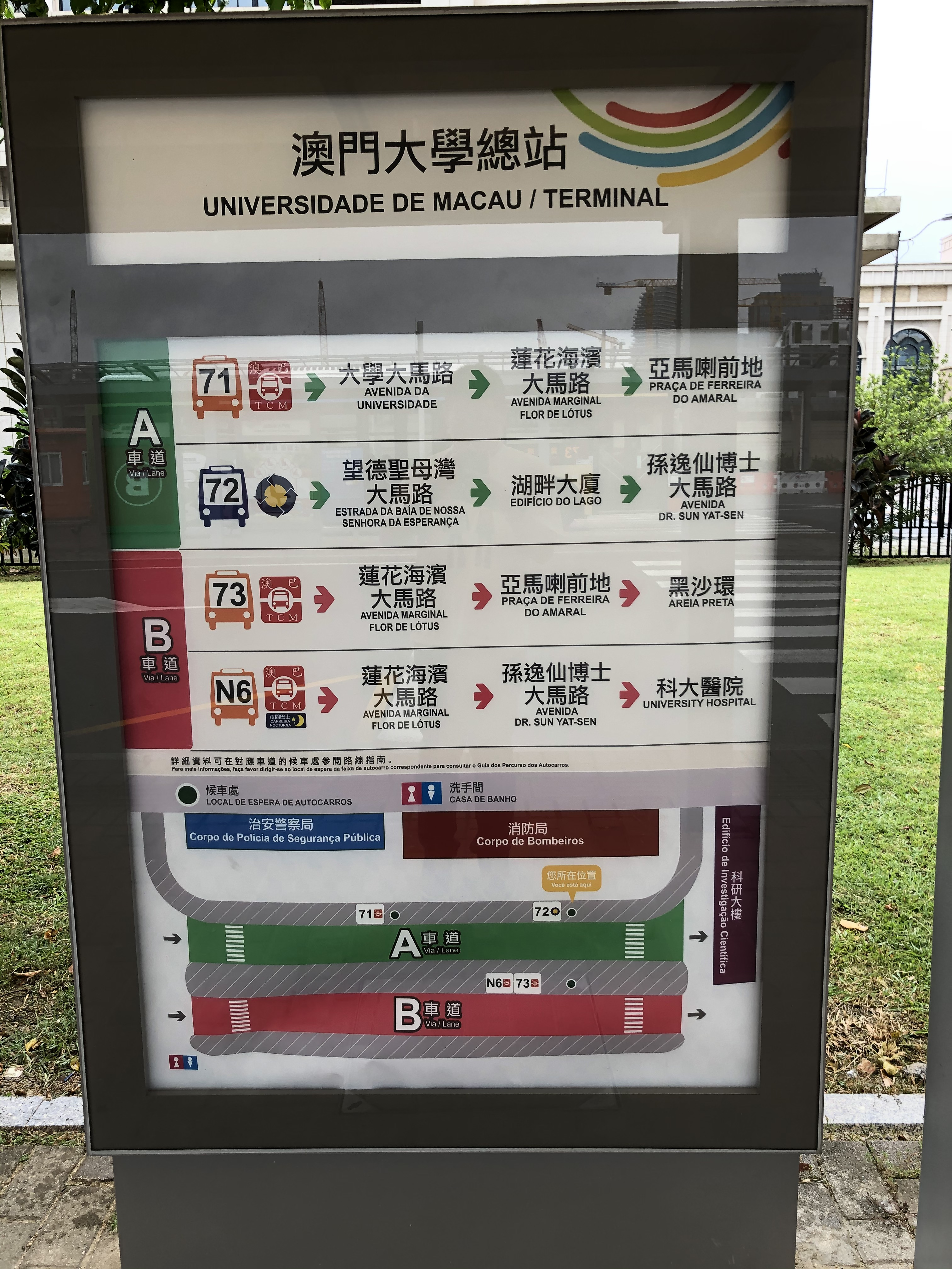 澳門大學總站的行車指示牌。